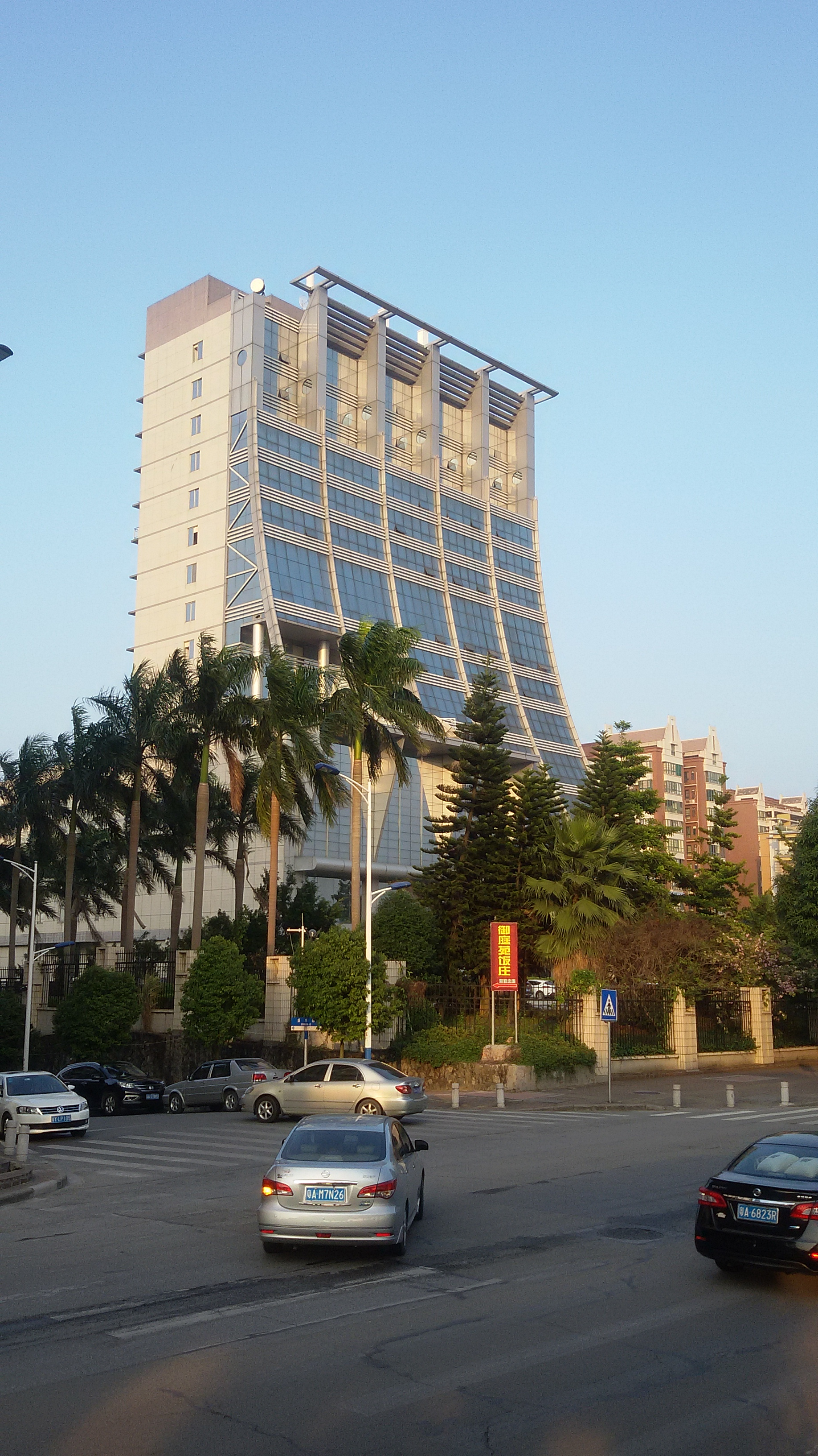 粵語: 从化广播电视台嘅建筑大楼